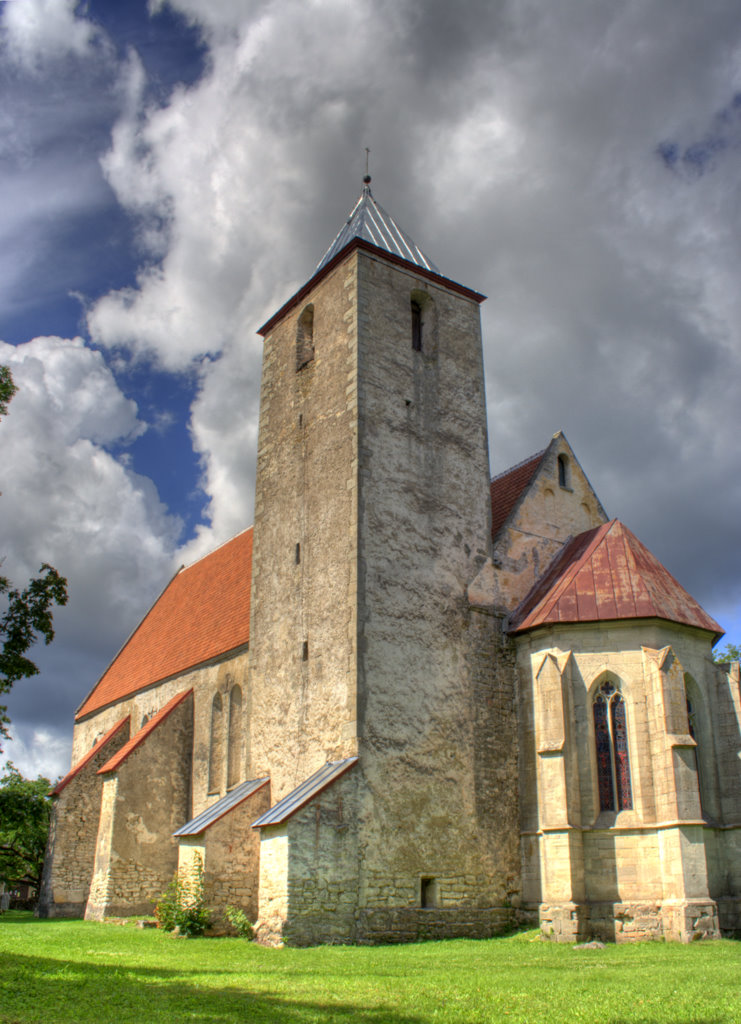 Valjala kirik, 2007